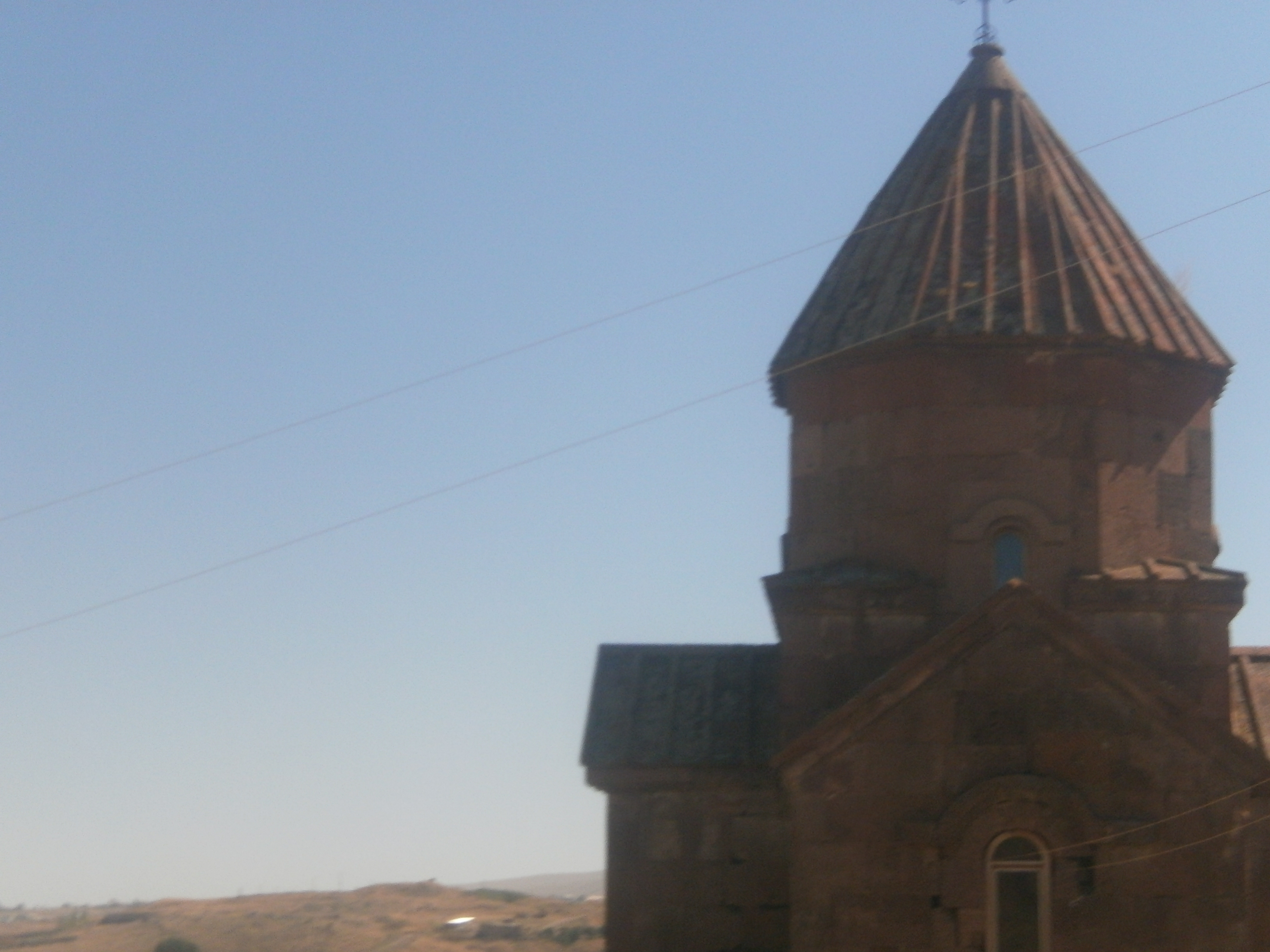 Լմբատավանք, Արթիկ 2/5.1